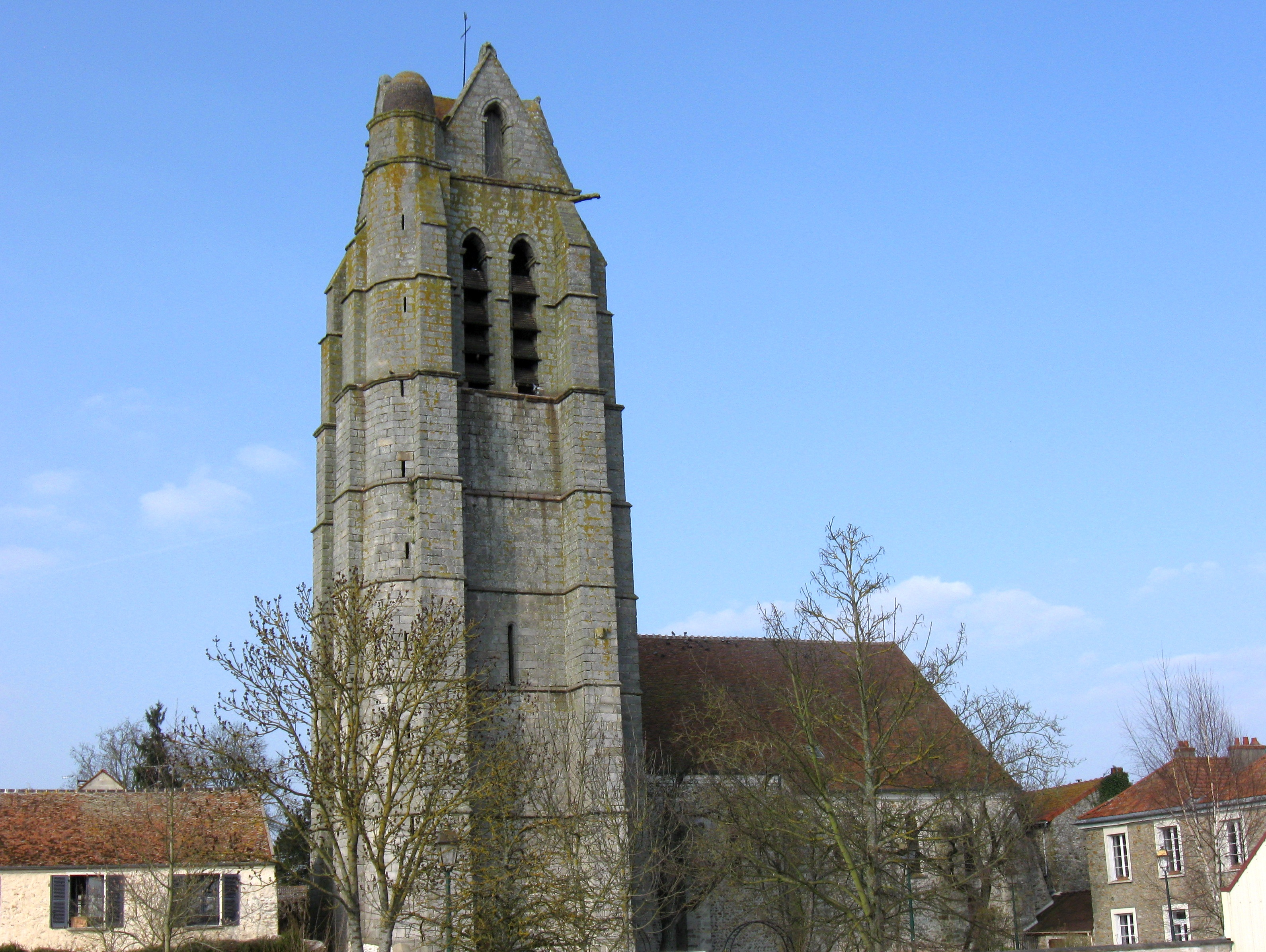 Église Notre-Dame de l'Assomption de Presles-en-Brie. (Seine-et-Marne, région Île-de-France).